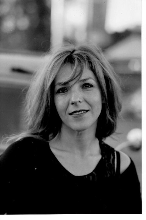 Escritora y periodista internacional